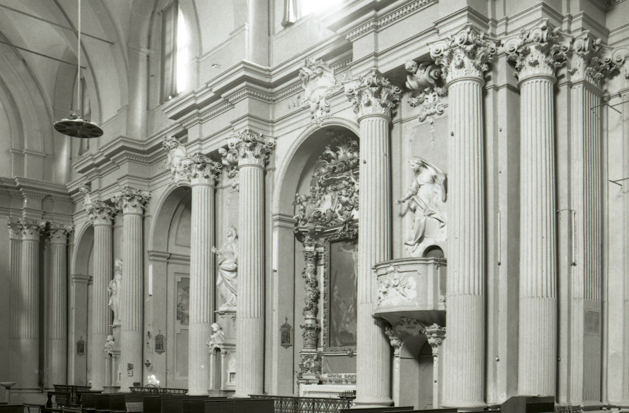 Angelo e Domenico Piò, Decorazioni di S. Agostino a Imola, architettura D. Morelli, Imola.